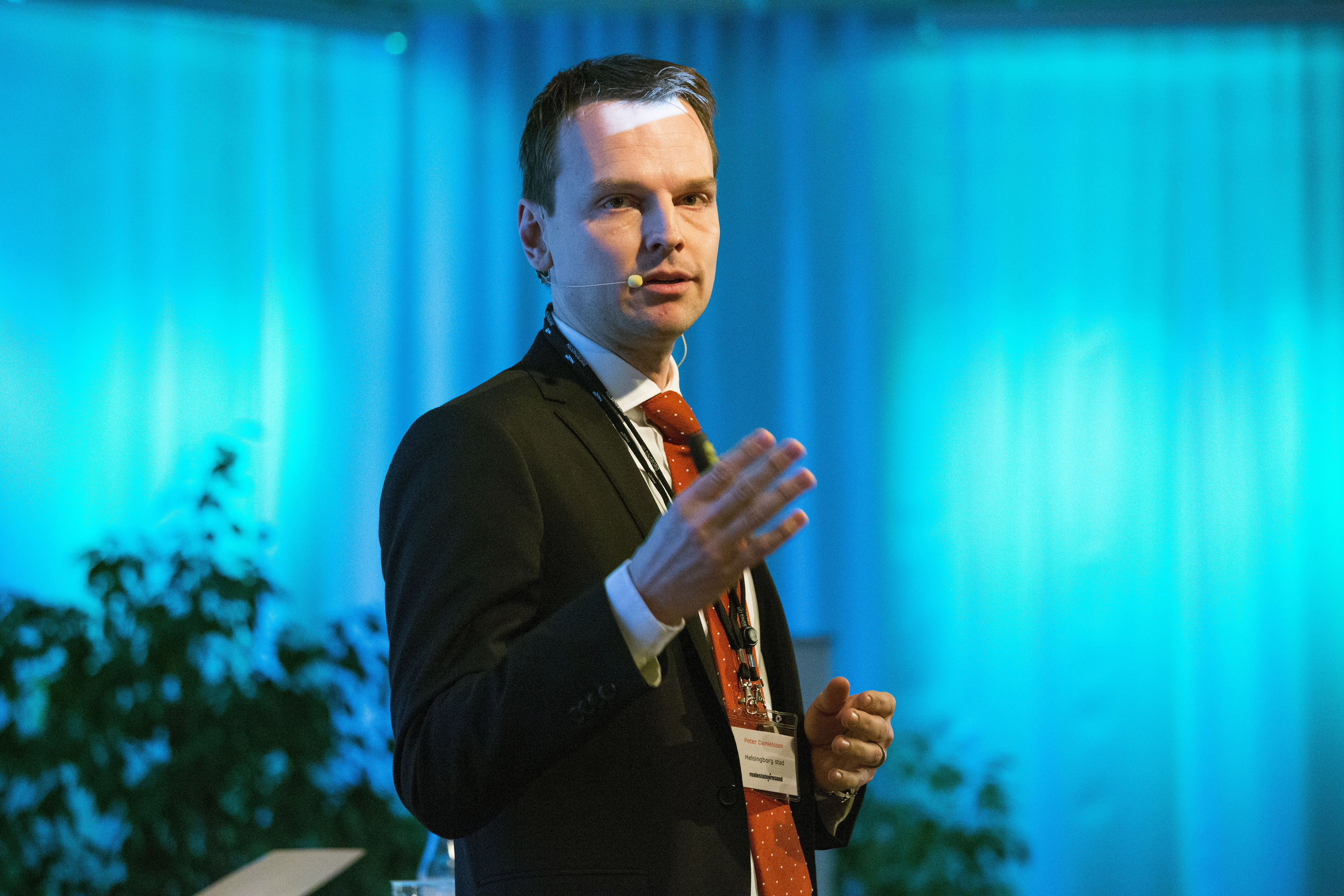 Peter Danielsson (m), kommunstyrelsens ordförande i Helsingborgs stad fotograferad 31 januari 2013 när han talade vid fastighetskonferensen Real Estate Øresund i Malmö Börshus. Foto: News Øresund - Johan Wessman. © News Øresund. Bilden får fritt publiceras under förutsättning att källa anges (Foto: News Øresund + fotografnamn). The picture can be used freely under the prerequisite that the source is given (Photo: News Øresund + the name of the photografer. Originalfil tillhandahålles gratis, kontakta: News Øresund, Malmö, Sweden. News Øresund är en oberoende regional nyhetsbyrå som ingår i projektet Øresund Media Platform som drivs av Øresundsinstituttet i partnerskap med Lunds universitet och Roskilde Universitet och med delfinansiering från EU (Interreg IV A Öresund) och 14 regionala, icke kommersiella, aktörer.